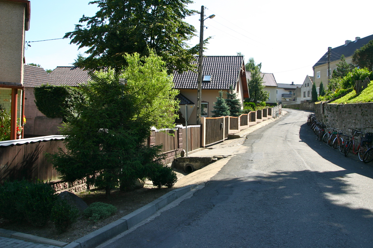 Komorniki (dodatkowa nazwa w j. niem. Komornik) – wieś w Polsce położona w województwie opolskim, w powiecie krapkowickim, w gminie Strzeleczki.